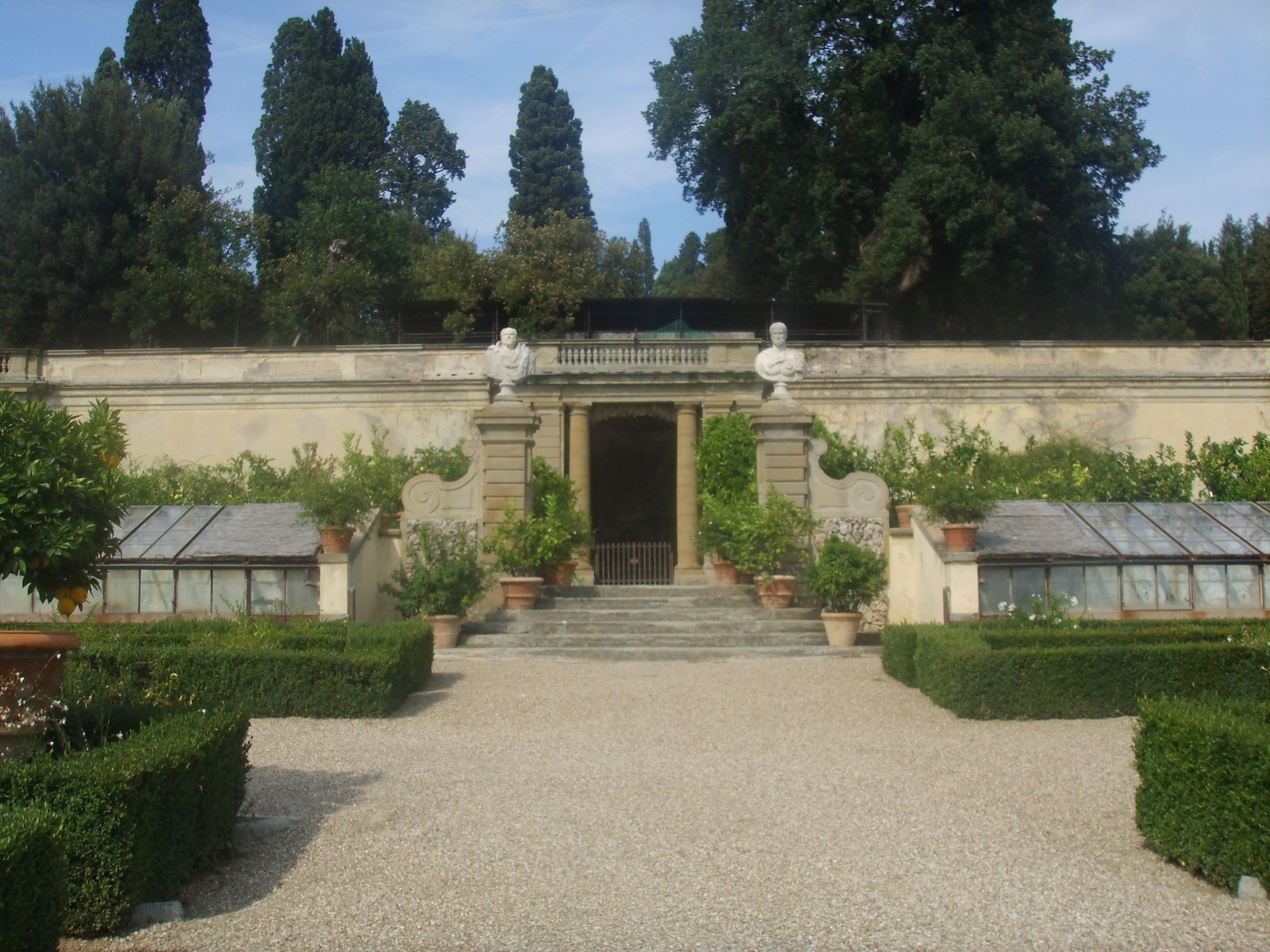 Parco di Villa Reale di Castello (Villa di Castello) in Florence Italy